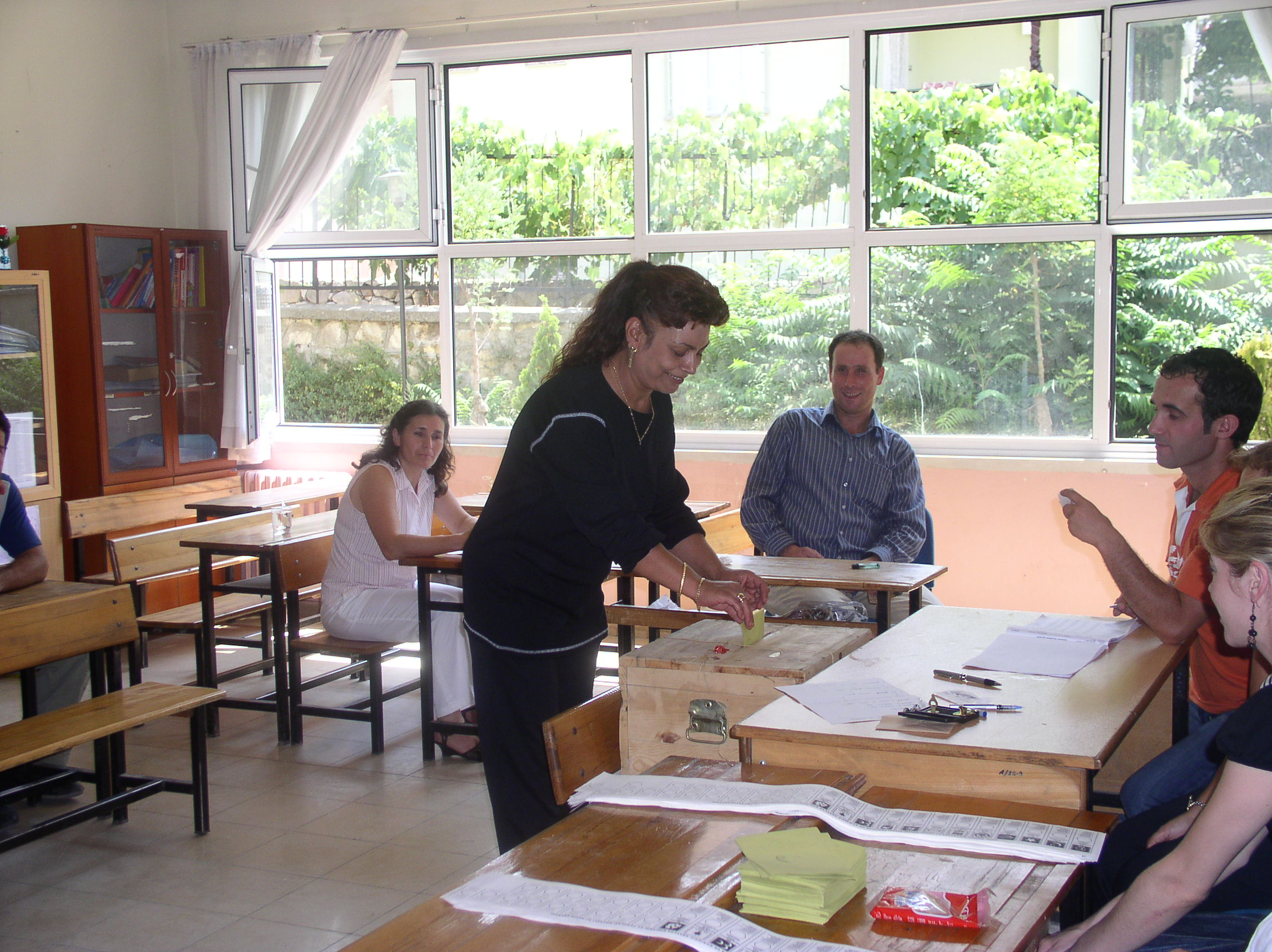 Voting